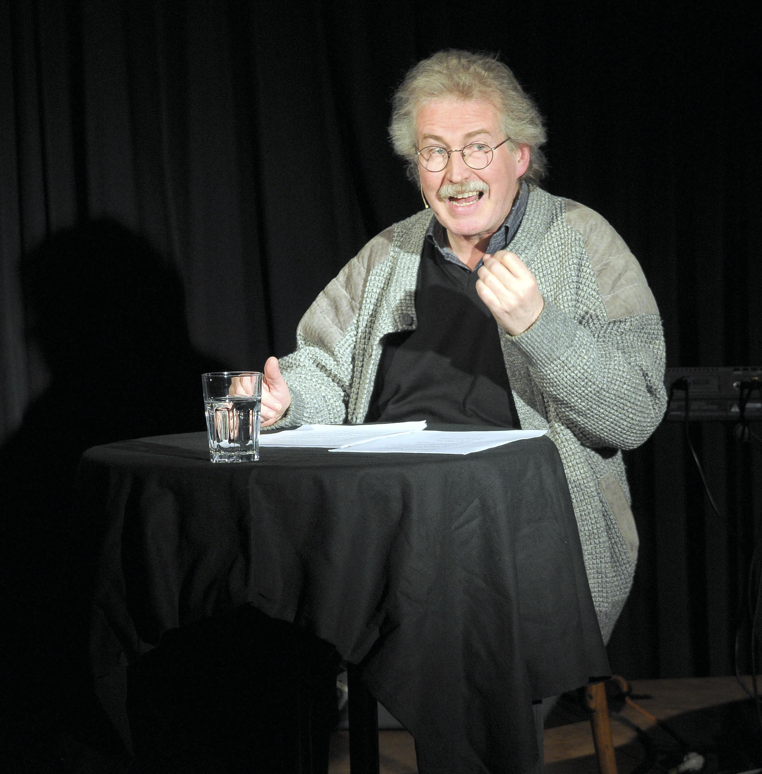 Wendelin Haverkamp-Denken in seinem Programm Denken ist Glücksache